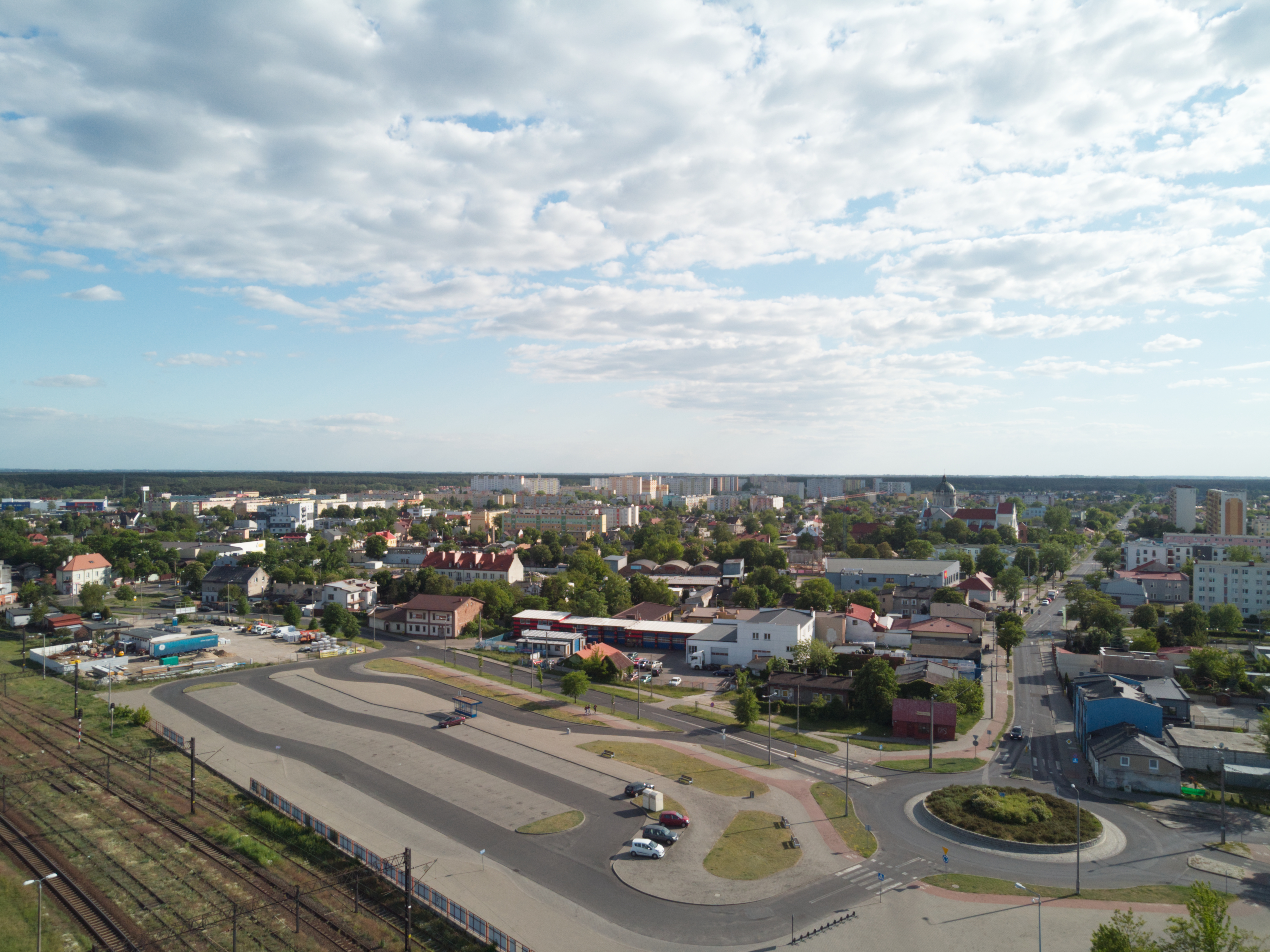 Południe (2020 r.)